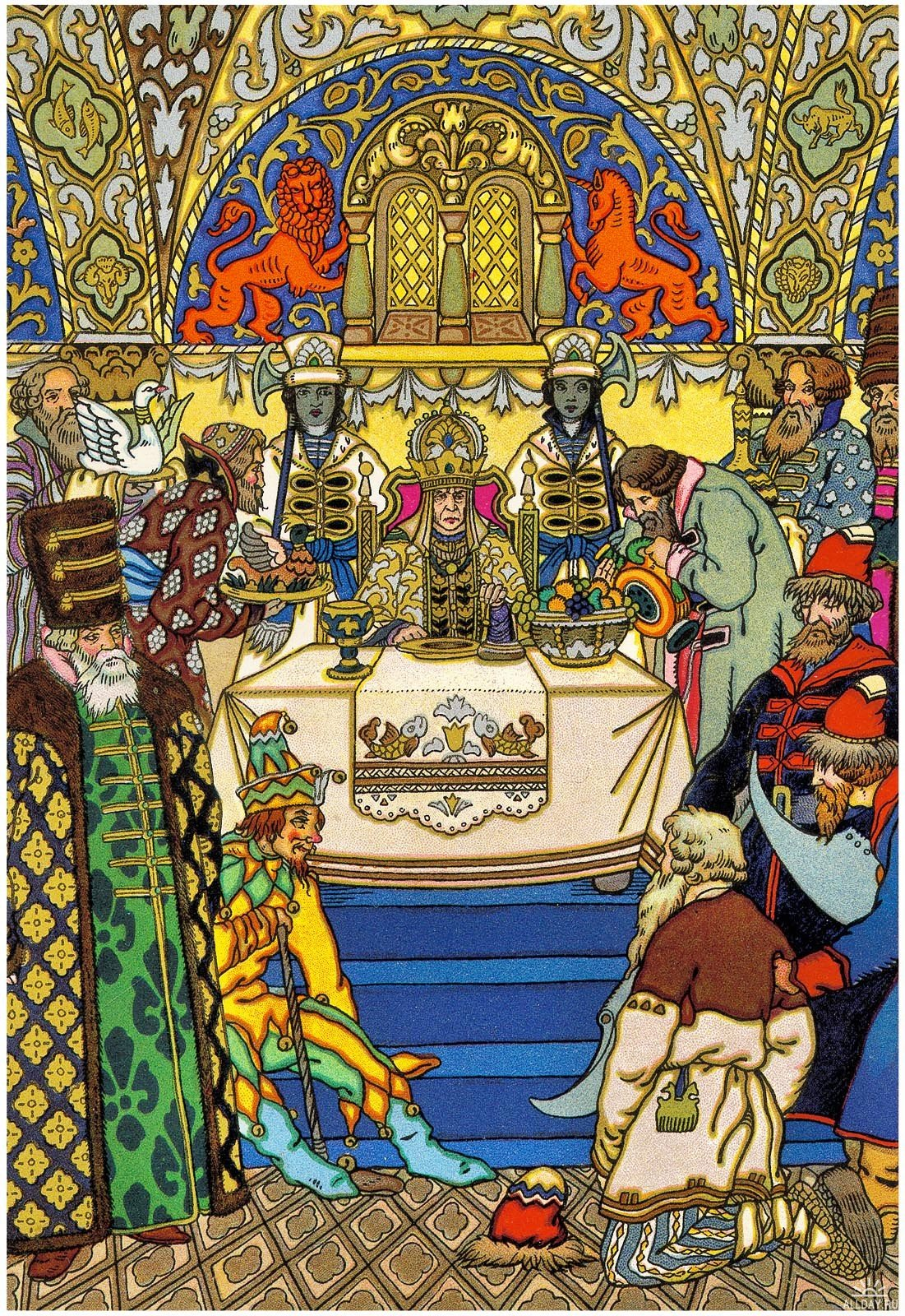 Сказка о рыбаке и рыбке